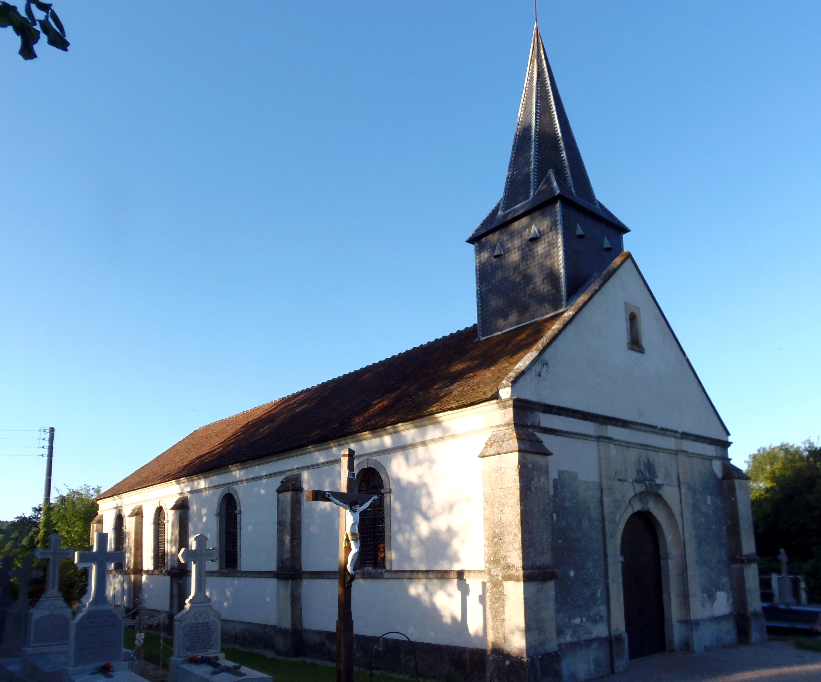 Mont-Ormel (Normandie, France). L'église Notre-Dame.